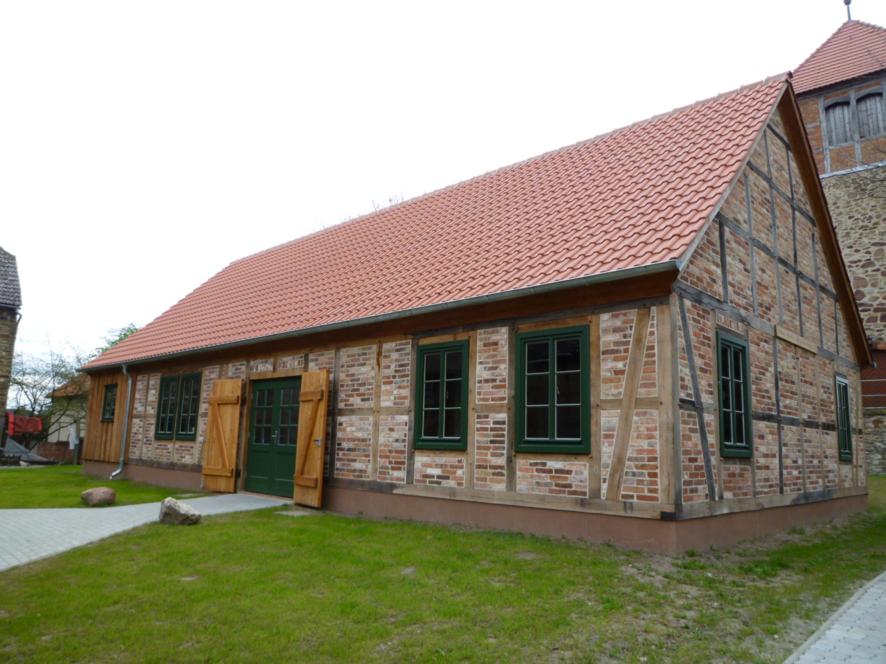 Calvörde-Wegenstedt, Samuel Walther Geschichtswerkstatt, Bild 1